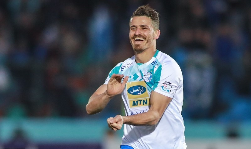 وریا غفوری در بازی مقابل پیکان در زمستان ۹۷